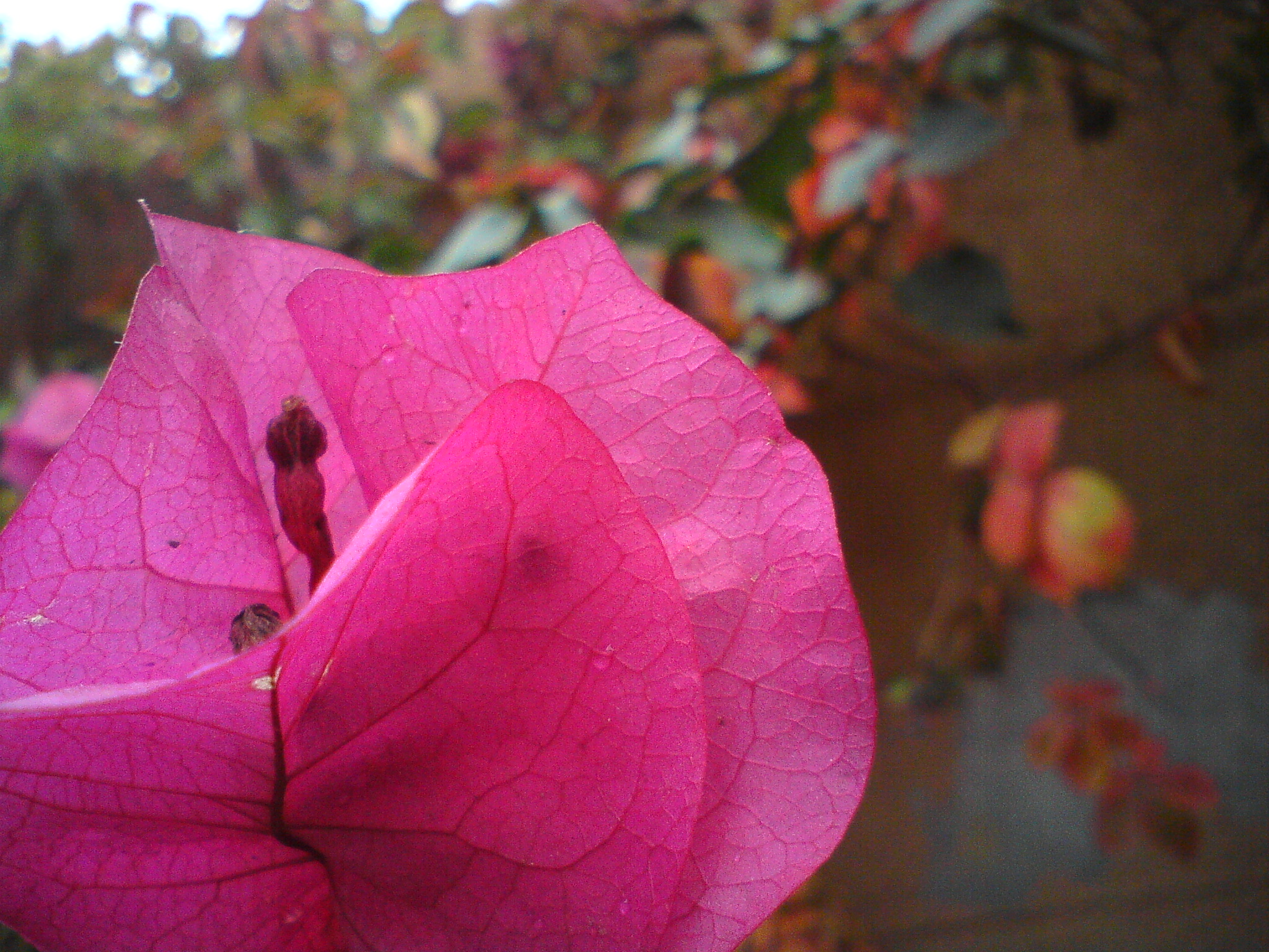 Foto de una flor tomada con un celular Sony Ericsson C510.